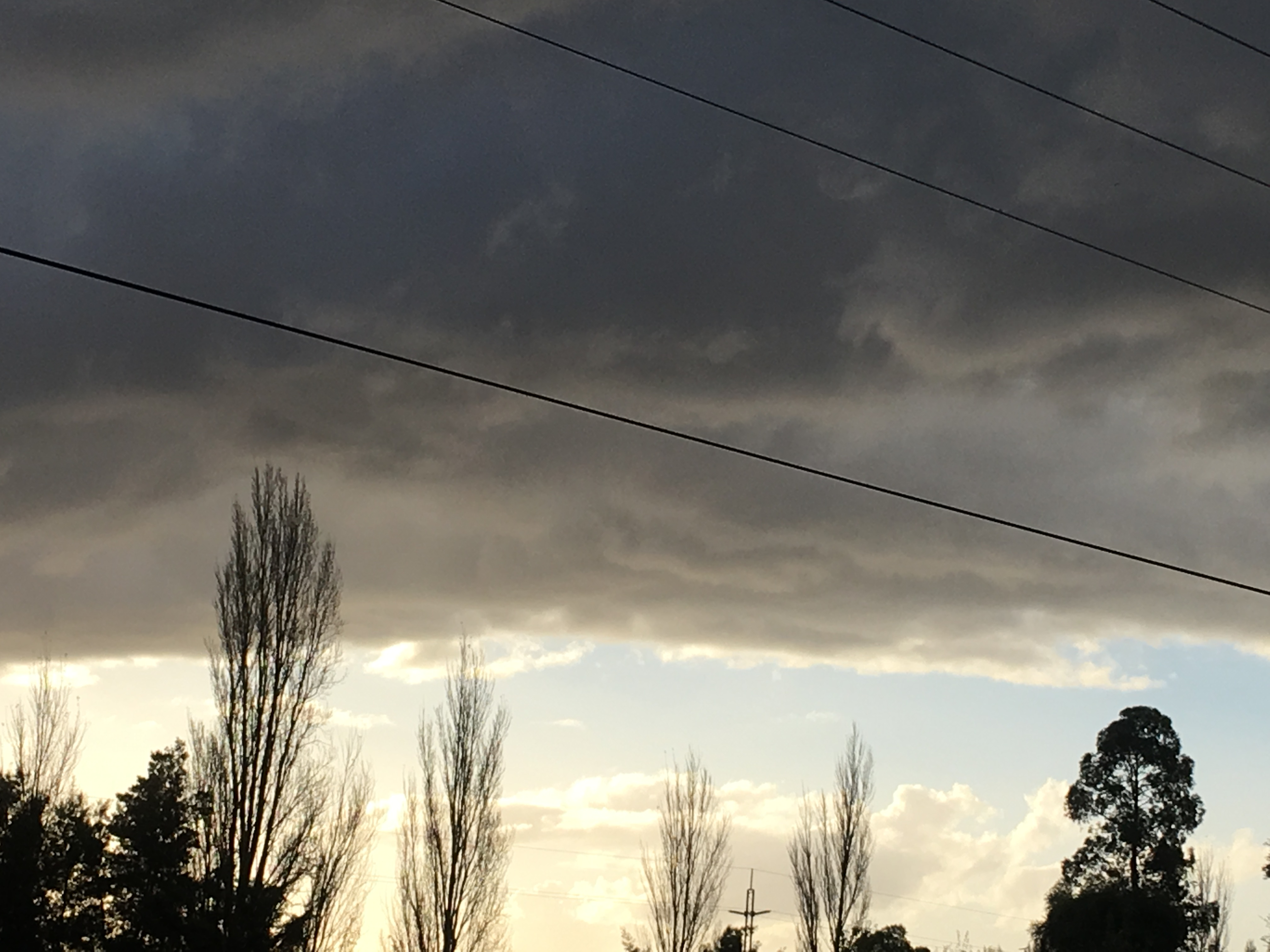 Nube de Cumulonimbus arcus, cerca de Los Ángeles, Chile.